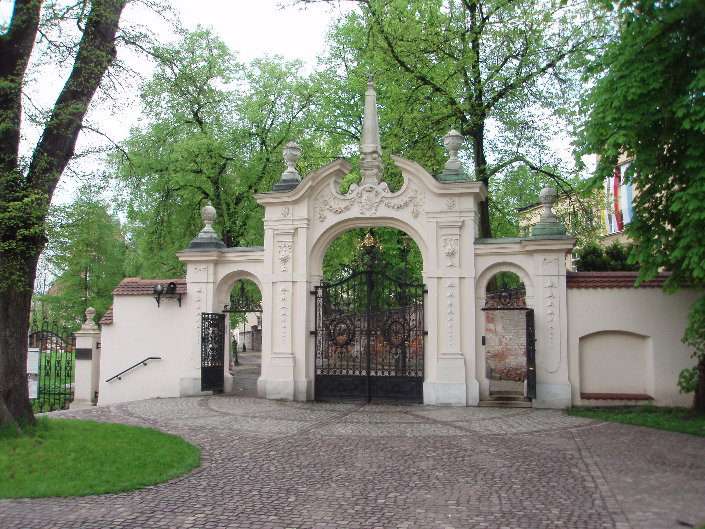 Kościół Na Skałce